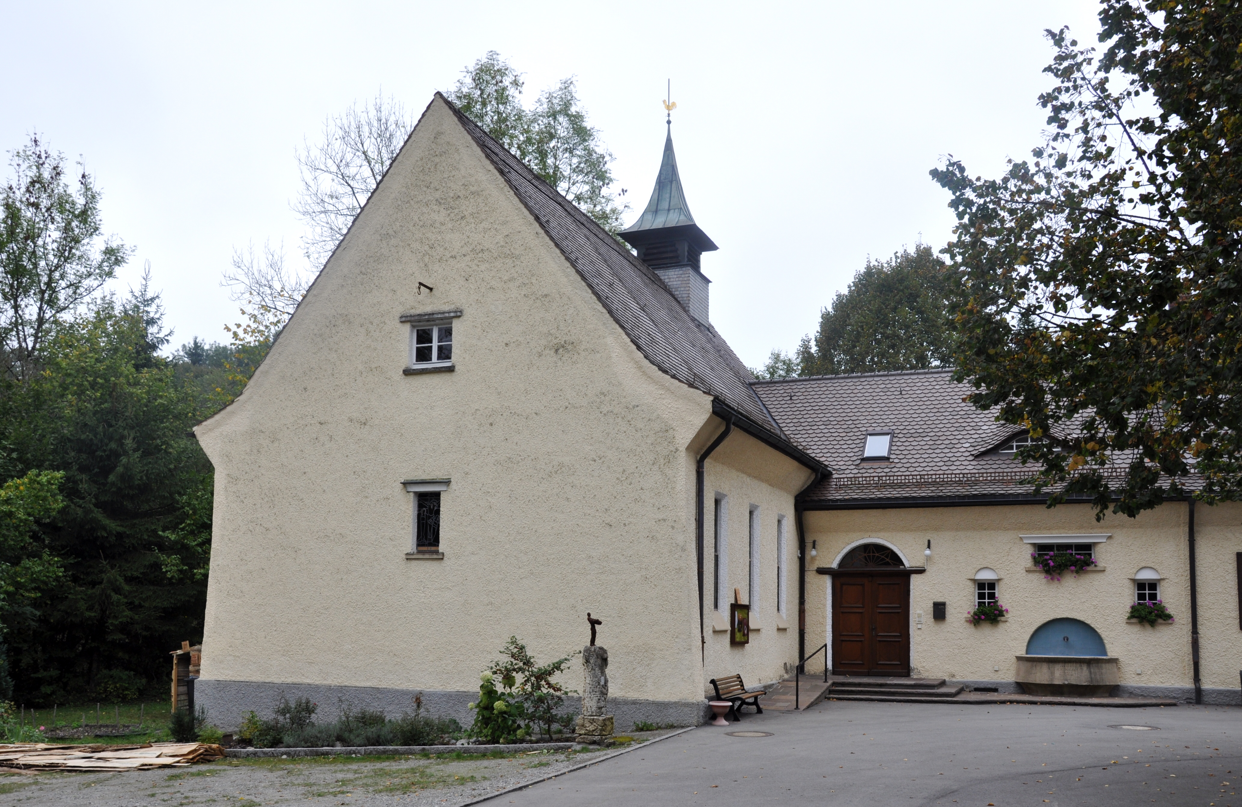 Wolfegg, Ortsteil Alttann, Evangelische Kirche in der "Höll"